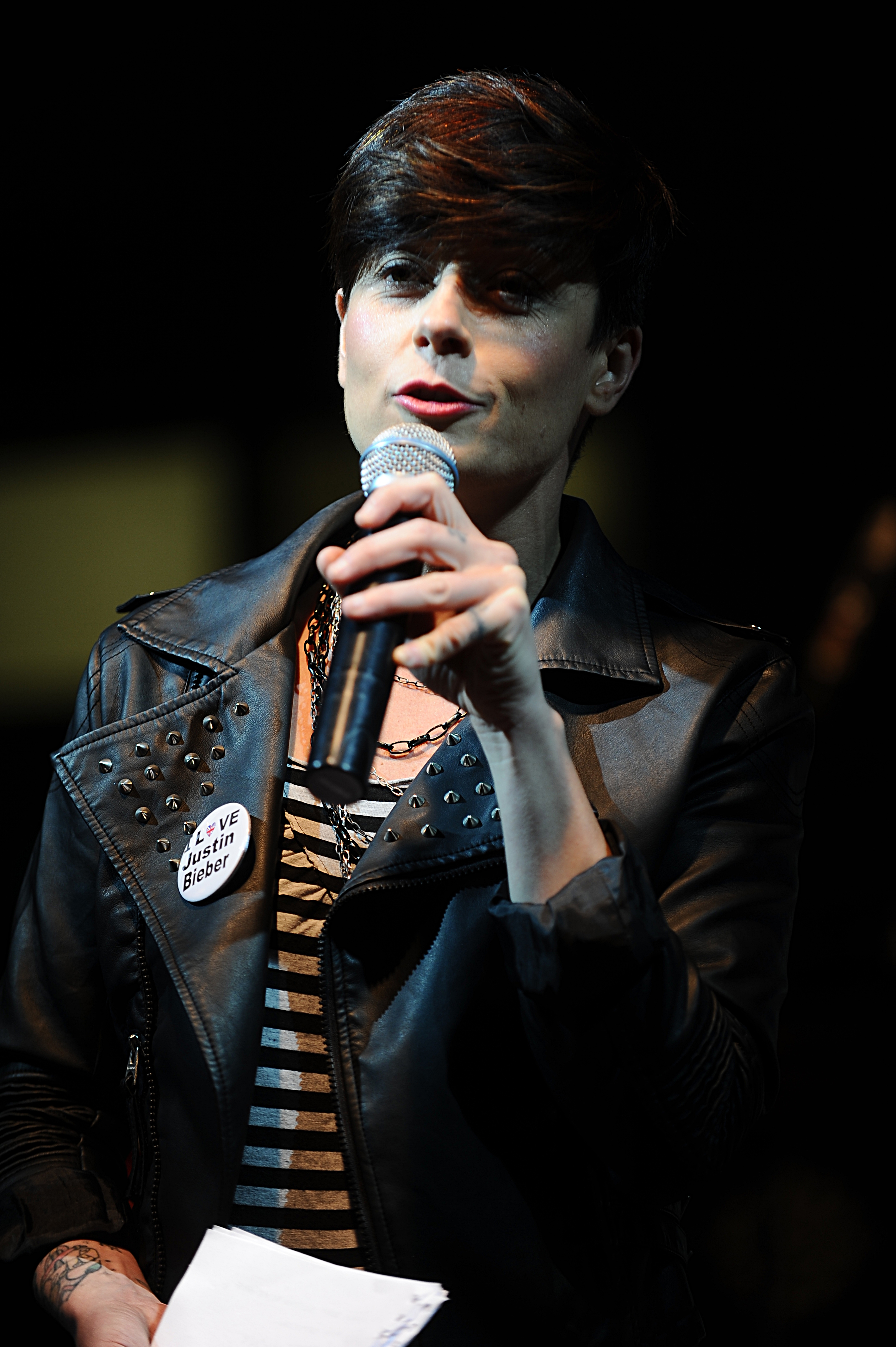 Mariolina Simone a Pisa all'edizione 2012 Festival delle Radio Universitarie.